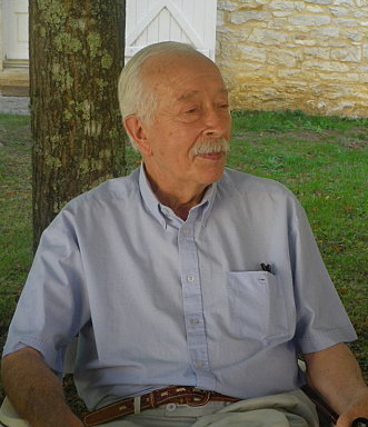 Philippe Boiry en Dordoña